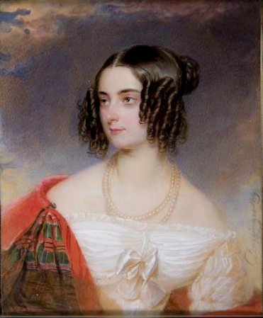 Delfina z Komarów Mieczysławowa hrabina Potocka